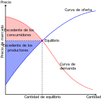 Oinarrizko teoria